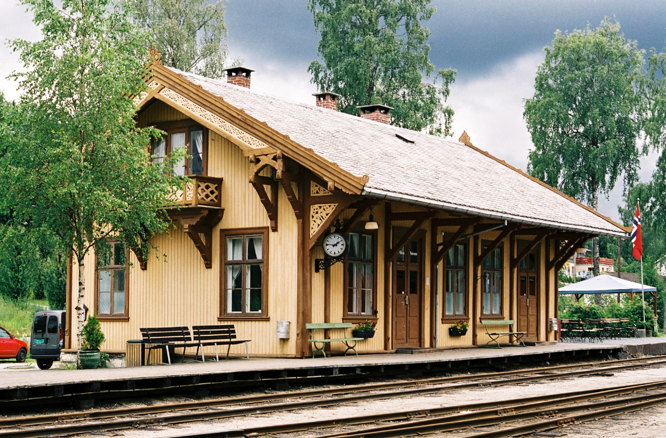 Krøderen stasjon, Krøderbanen. Bygd 1872. Arkitekt:Georg Andreas Bull. Freda 1981.